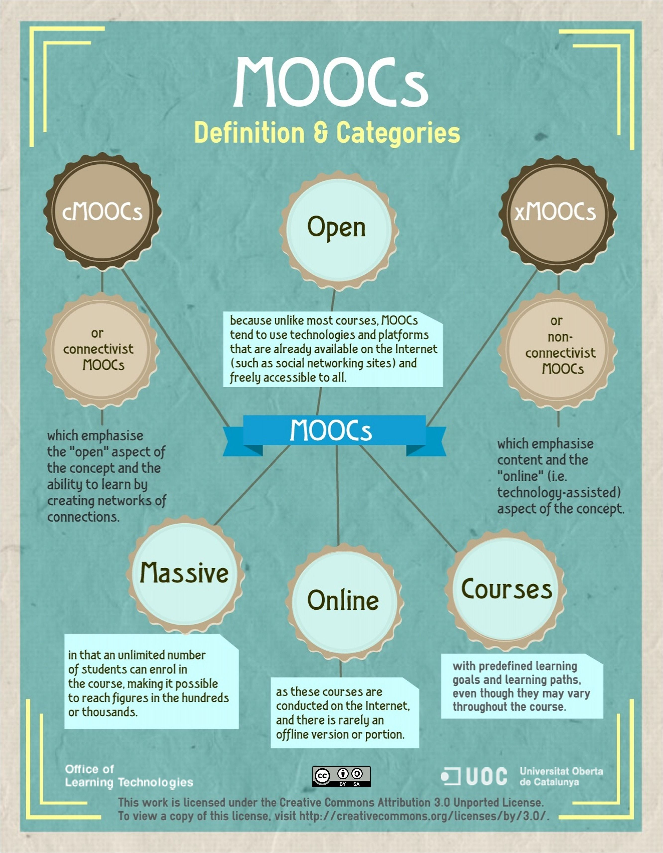 mooc